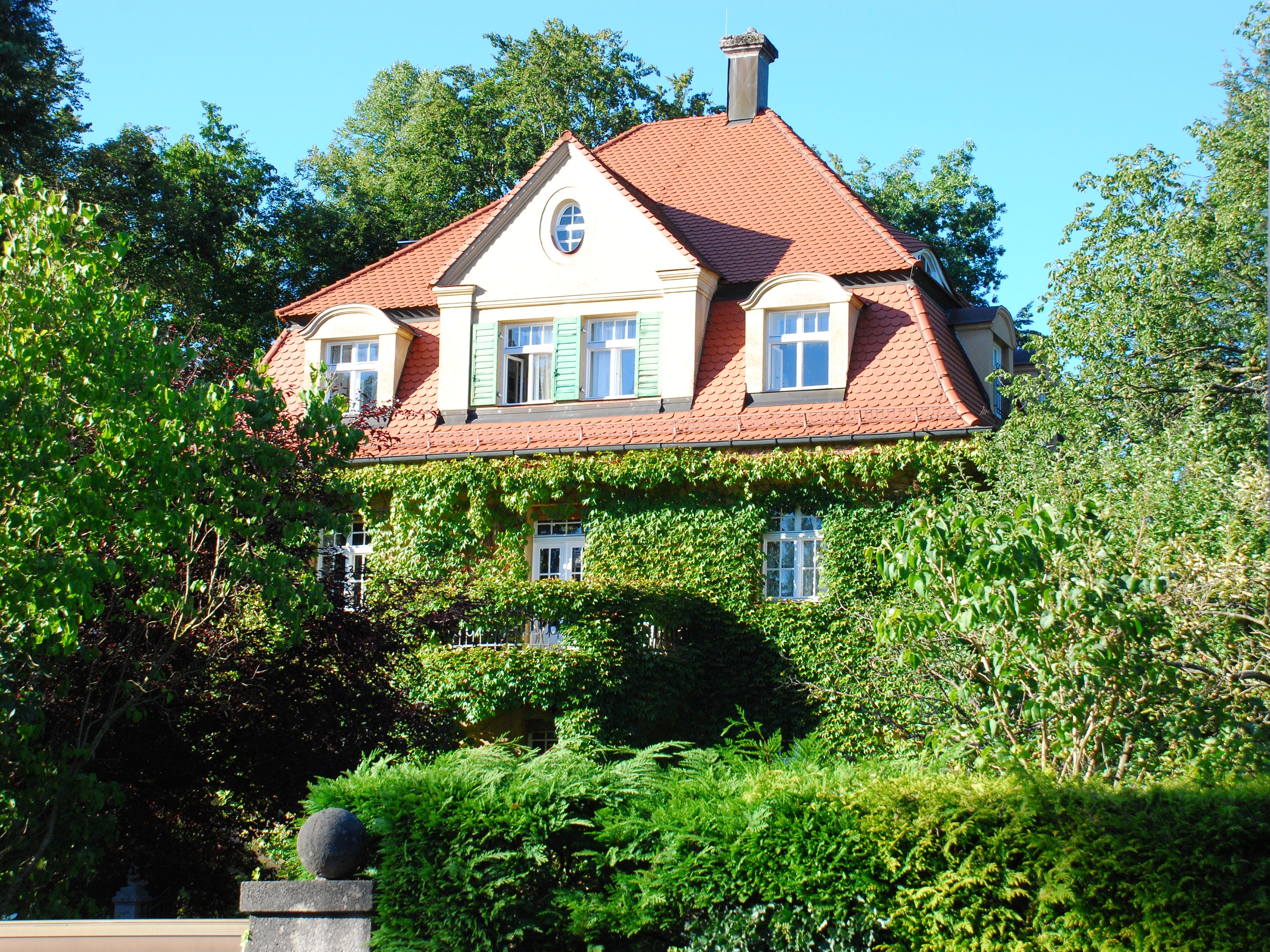 Haus in der Grosostraße 12 in Gräfelfing, Landkreis München, Regierungsbezirk Oberbayern, Bayern. Als Baudenkmal in der Bayerischen Denkmalliste aufgeführt. Laut Denkmalliste in den Jahren 1915/1916 erbaut.